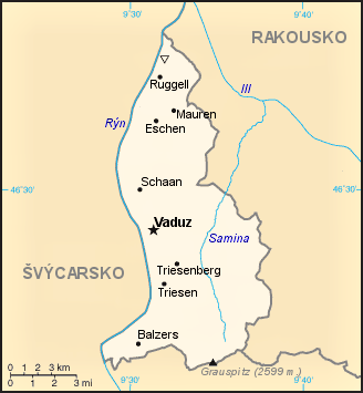 Orientační mapa Lichtenštejnska.